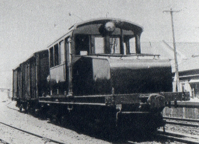 渥美電鉄ED1形